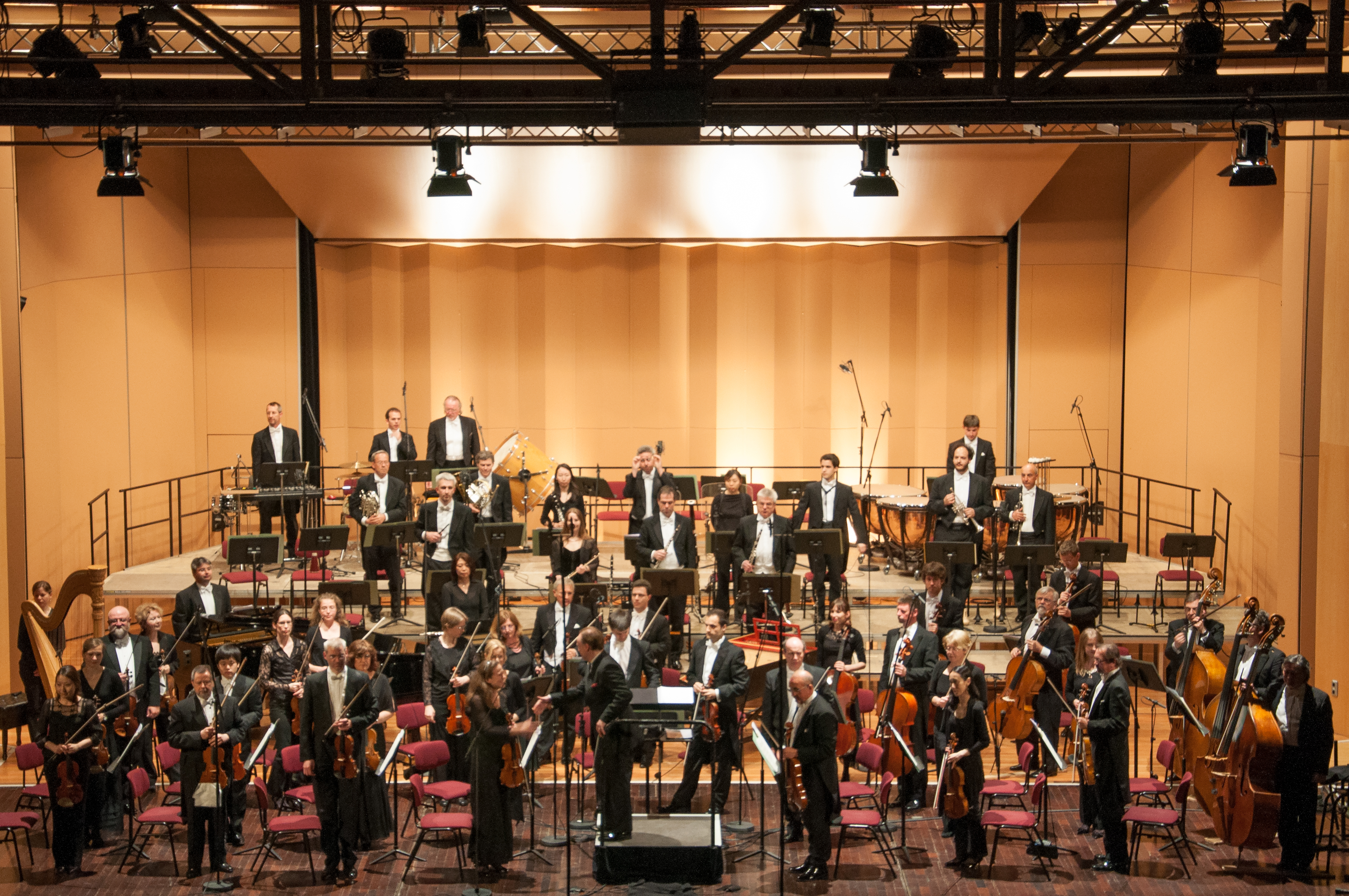 Göttinger Symphonie Orchester bei den Internationalen Händel-Festspiele Göttingen unter der Leitung von Generalmusikdirektor Christoph-Mathias Mueller